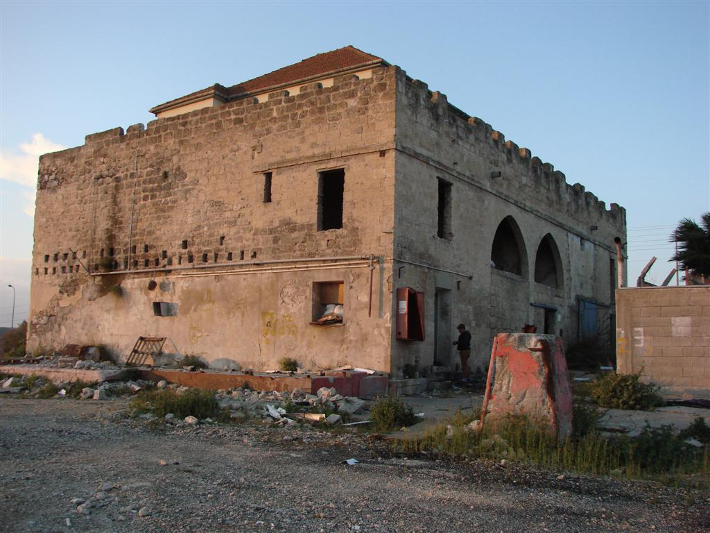 חאן רמת ישי - הפינה הדרום מזרחית 1